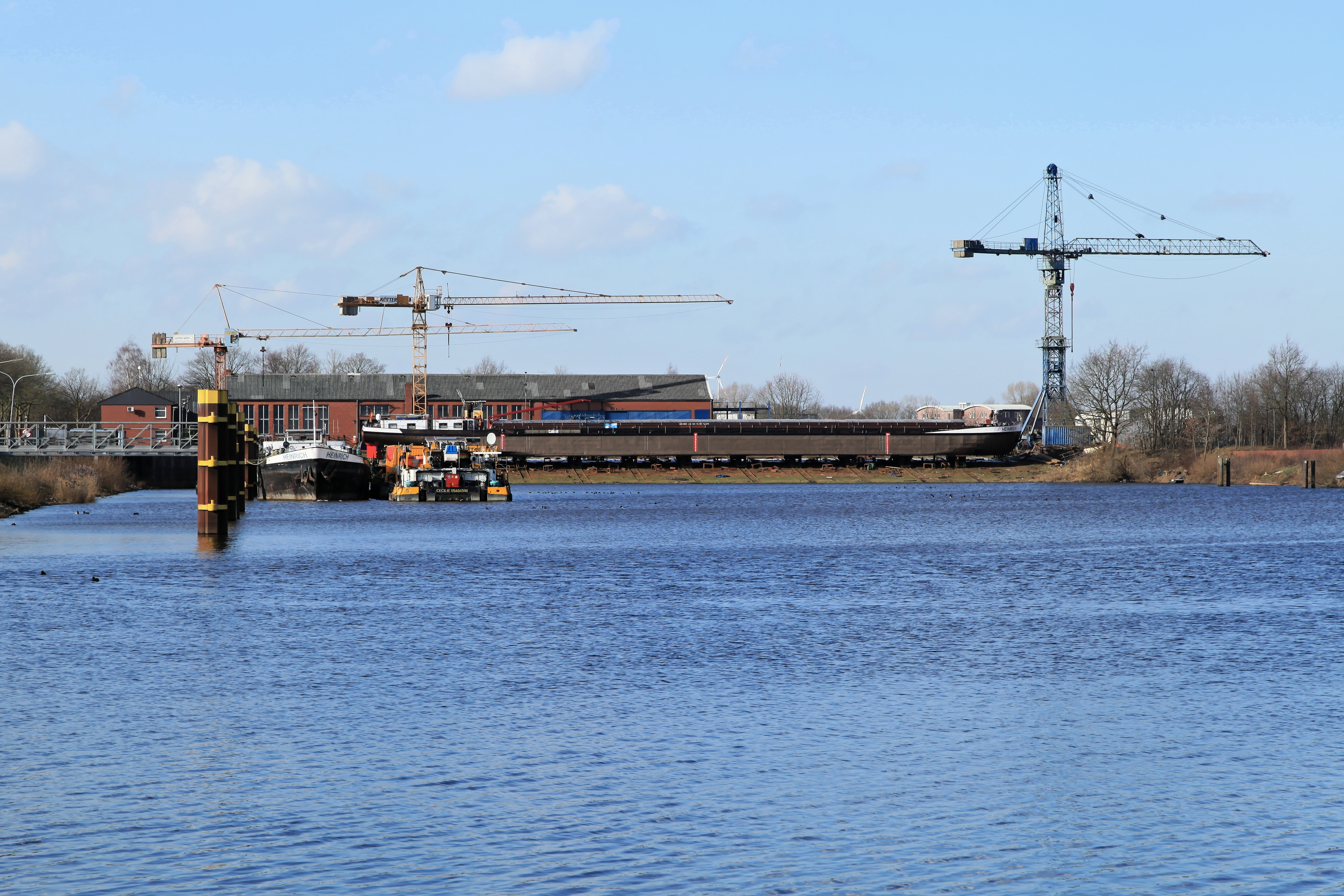 Neuer Hafen vor der Kötter-Werft, Am Neuen Hafen in Haren (Ems)